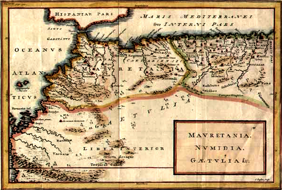 Carte de la Maurétanie et et de la Numidie, après la capture de Jugurtha